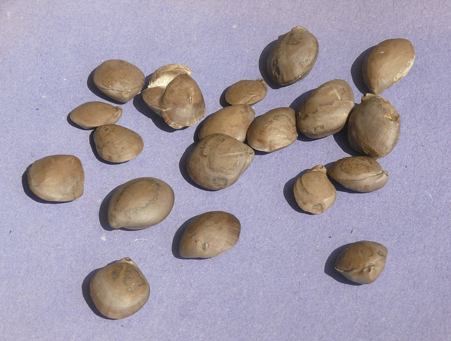 Coenothyris vulgaris (Syn. Terebratula vulgaris) aus der Trochitenkalk-Formation, Crailsheim-Subformation Hohenlohe, Deutschland